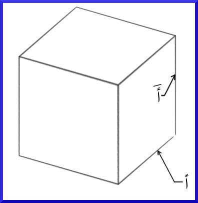 الضلع أَ المراد رسمه